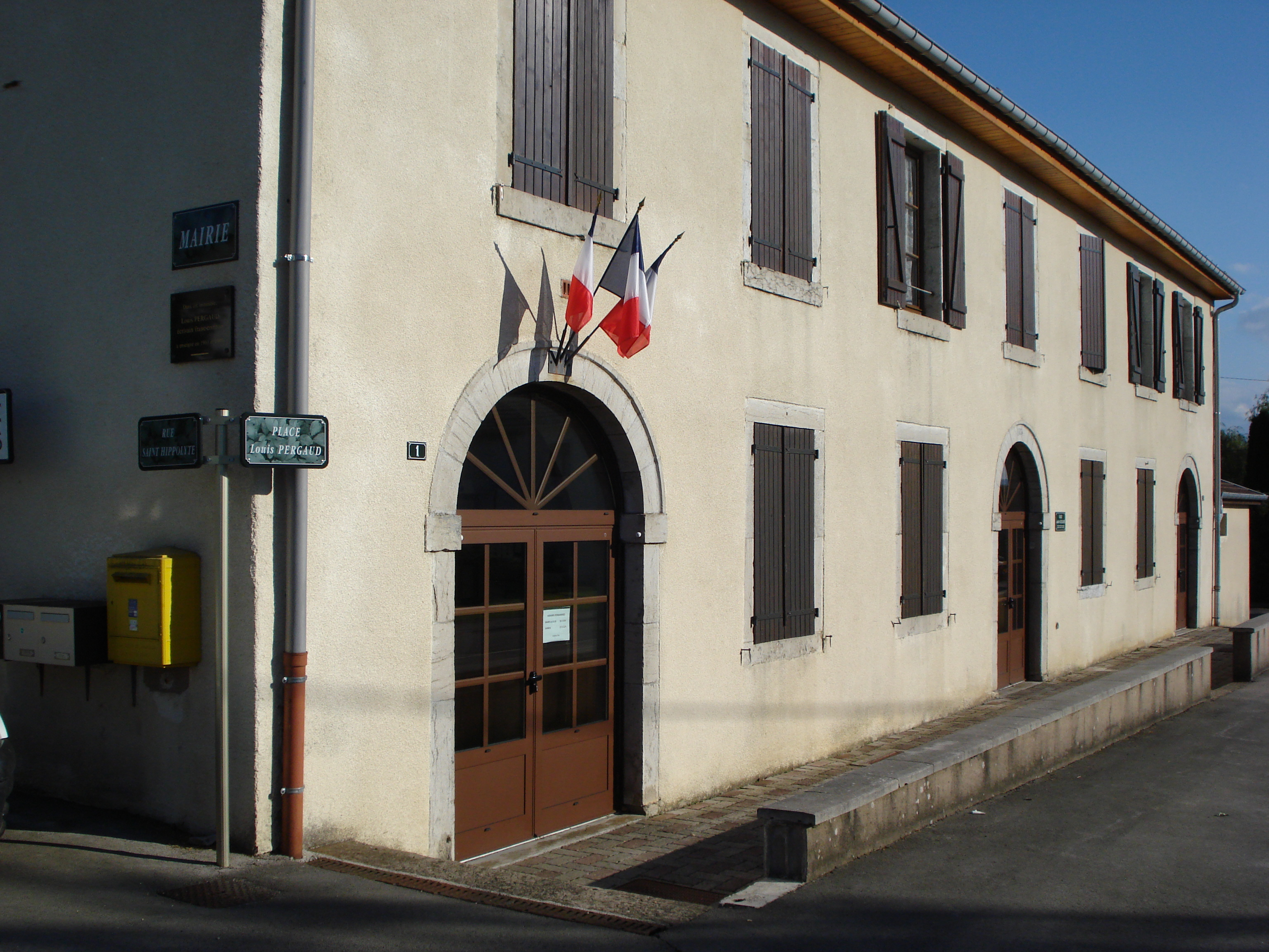 Mairie de Durnes, France. Plaques et entrée.